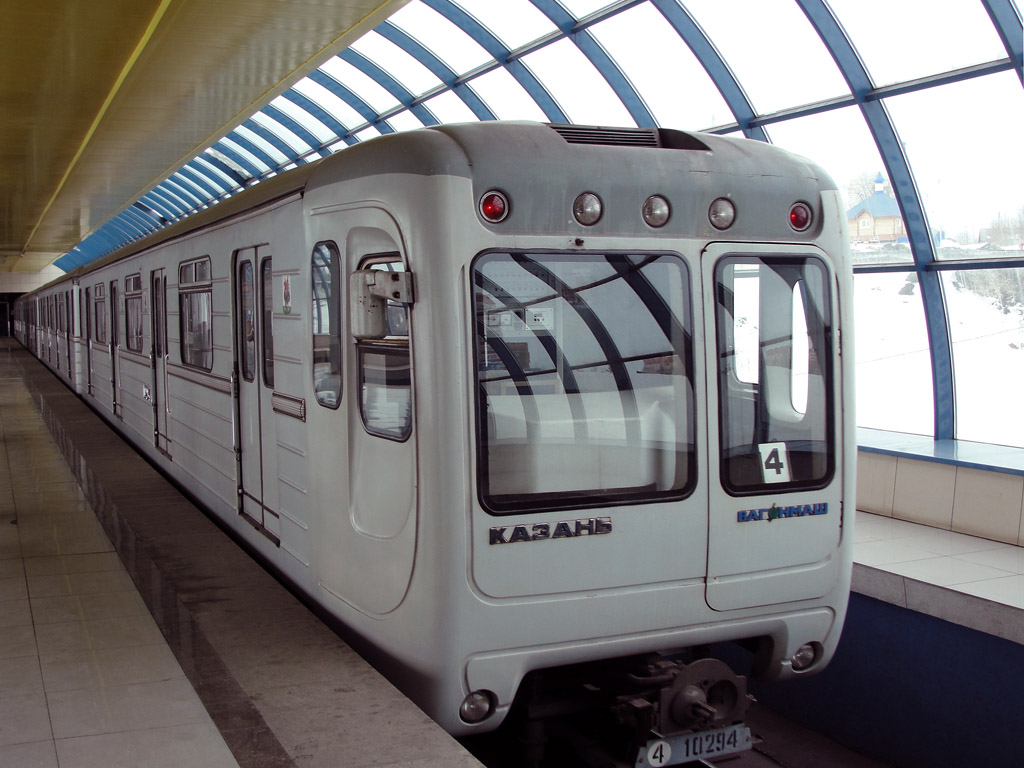 Вагон метрополитена 81-553.3 на станции Аметьево Казанского метрополитена.